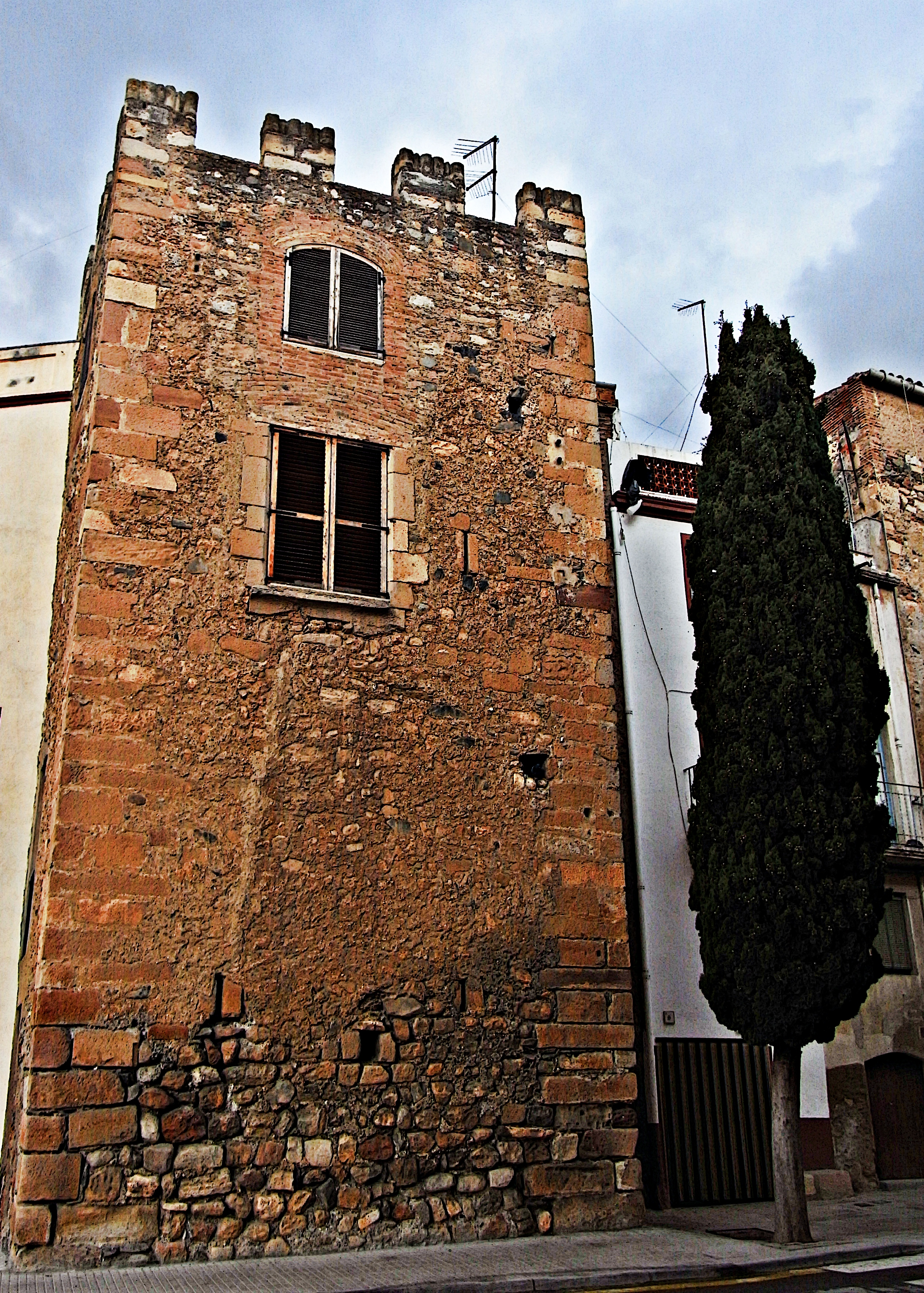 Centre històric de la Selva del Camp